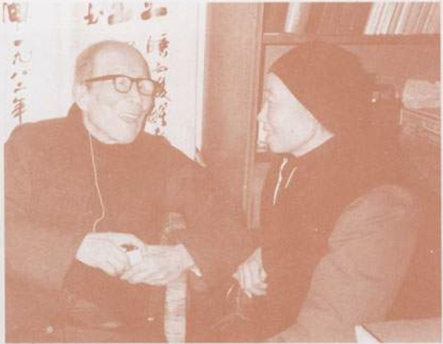 中文（中国大陆）: 1988年12月王明道与太太刘景文合影